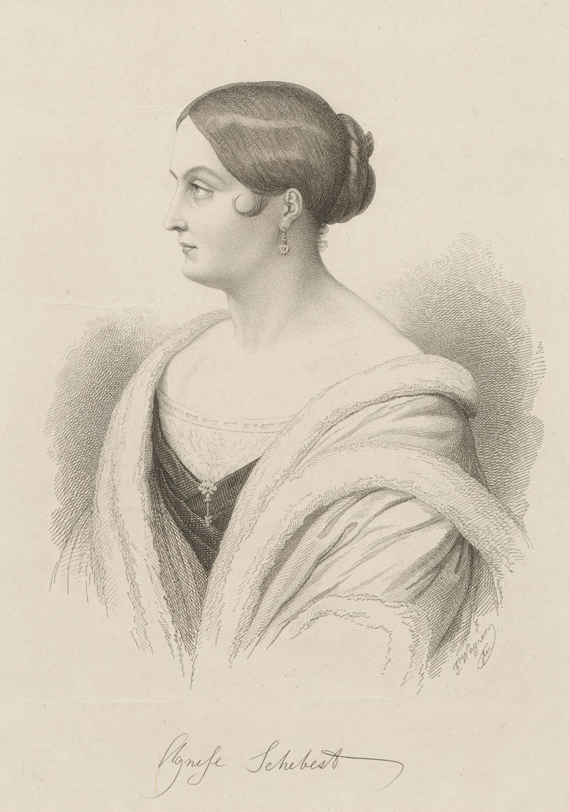 Porträt von Agnes Schebest (1813–1870), österreichische Opernsängerin. Radierung, Bildgröße: ca. 210 × 170 mm (Platte 325 × 240 mm). Blattgröße: 495 × 335 mm